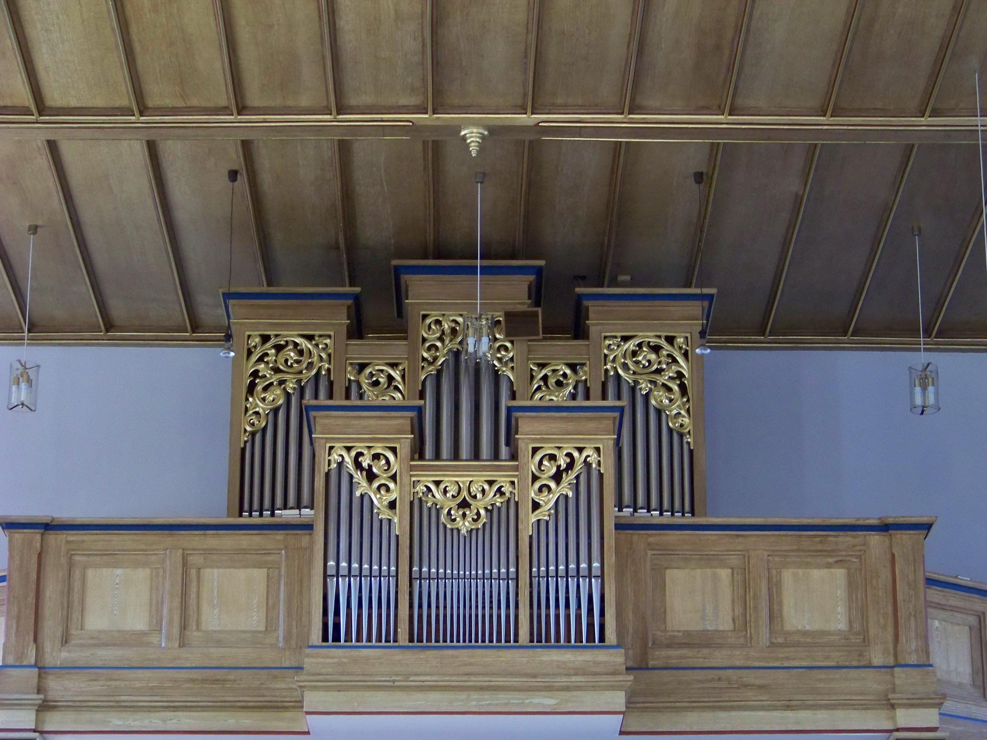 Laberweinting, Hofkirchen 77, katholische Pfarrkirche St. Peter erbaut 1863/64. Auf der oberern Empore wurde 1987 die alte pneumatische Orgel durch eine Schleifladenorgel mit rein mechanischer Ton- und Registertraktur ersetzt. Die Orgel stammt von der Orgelbaufirma Jann in Allkofen und besitzt 15 Register. Disposition: Hauptwerk C - g3 2. Manual Principal 8' Holzflöte 8' Salicional 8' Oktave 4' Gemshorn 4' Schwegel 2' Mixtur 4f 1 ⅓’ Rückpositiv C - g3 1. Manual Holzgedackt 8' Rohrflöte 4' Principal 2' Sesquialtera C = 2 ⅔' - f° = 2 ⅔ + 1 3/5 Quinte 2 ⅔' Scharff 3f 1' Oktave 1' Tremulant Pedal C - f' Subbass 16' Oktavbass 8' Holzflöte 8' Koppeln: I/II I/P II/P